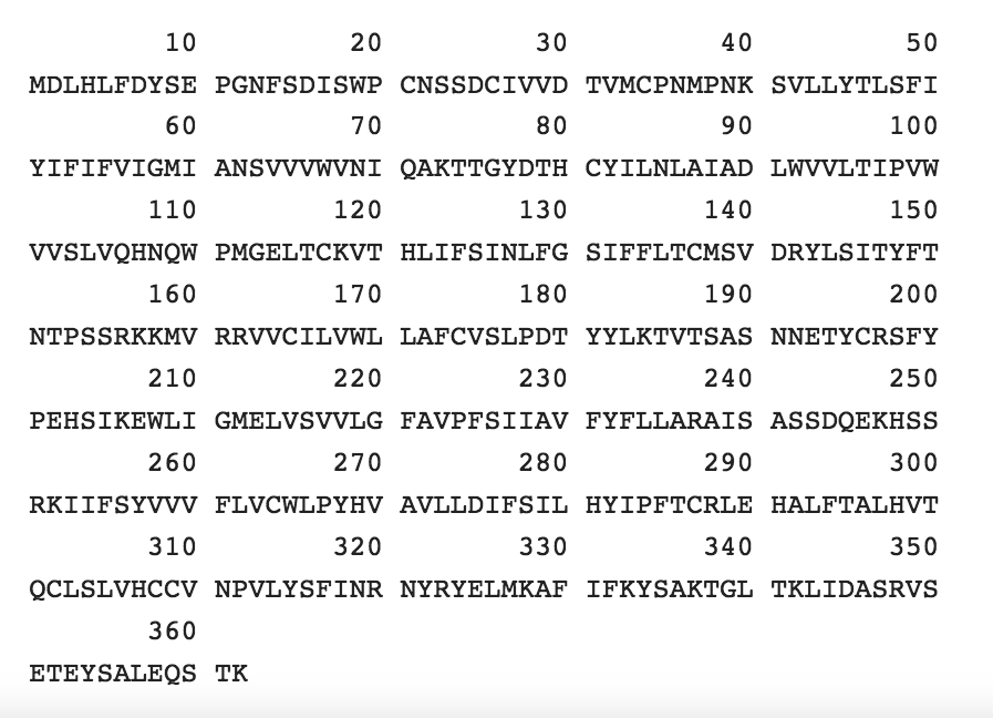 Secuencia de aminoacidos de la CXCR7